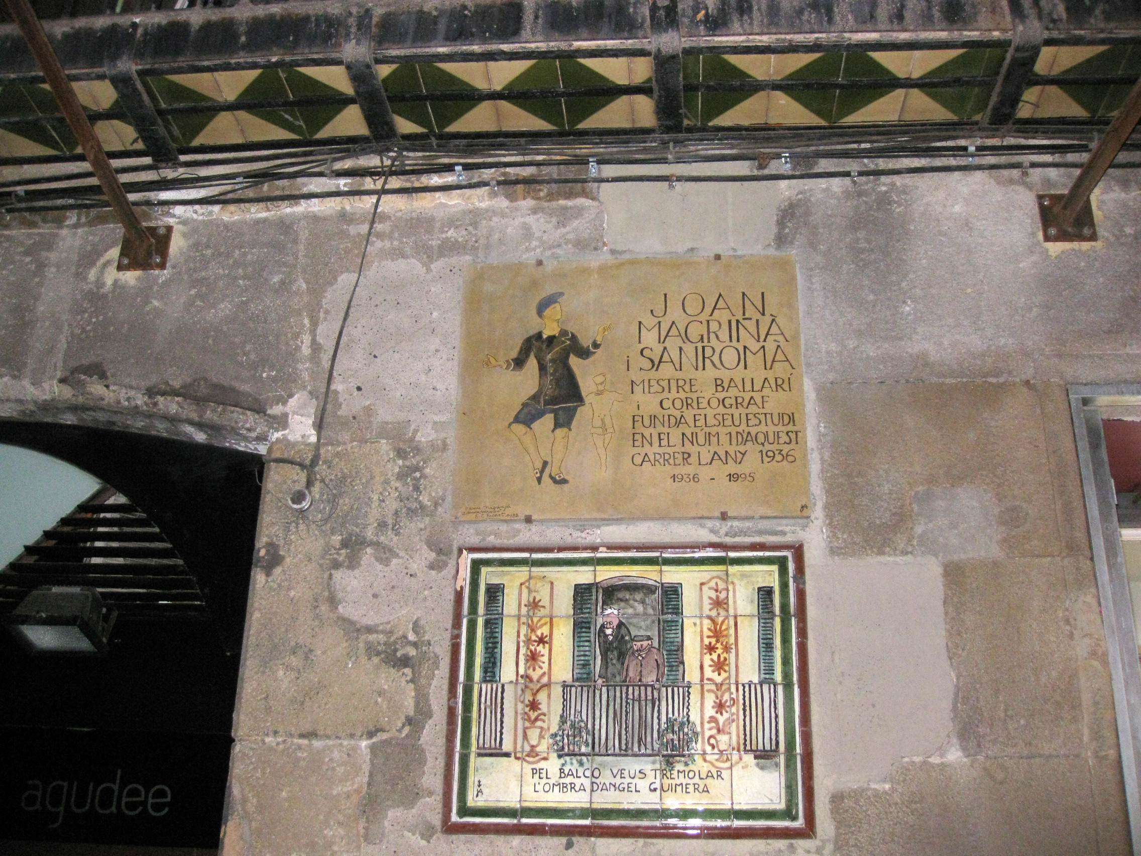 Placa en record de Joan Magriñà i una de les escenes de l'Auca del Senyor Esteve, en un edifici del segle XVIII situat al carrer de Petritxol núm. 1, al barri Gòtic de Barcelona